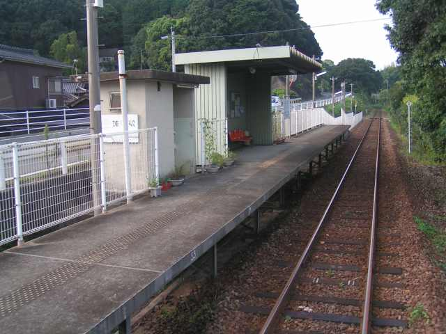 波瀬駅 投稿者が撮影(2006/08/28)